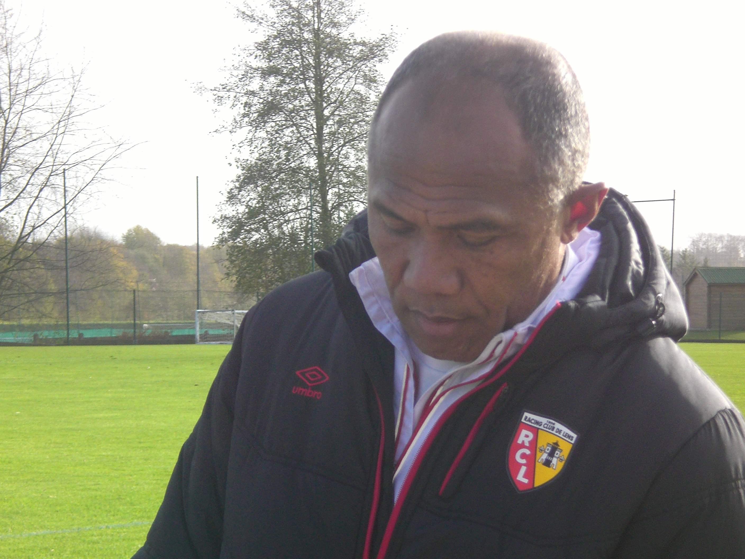 Antoine Kombouaré après un entraînement public du Racing Club de Lens, le 18 novembre 2015, sur le Stade San Siro, du Complexe Sportif de La Gaillette, à Avion.